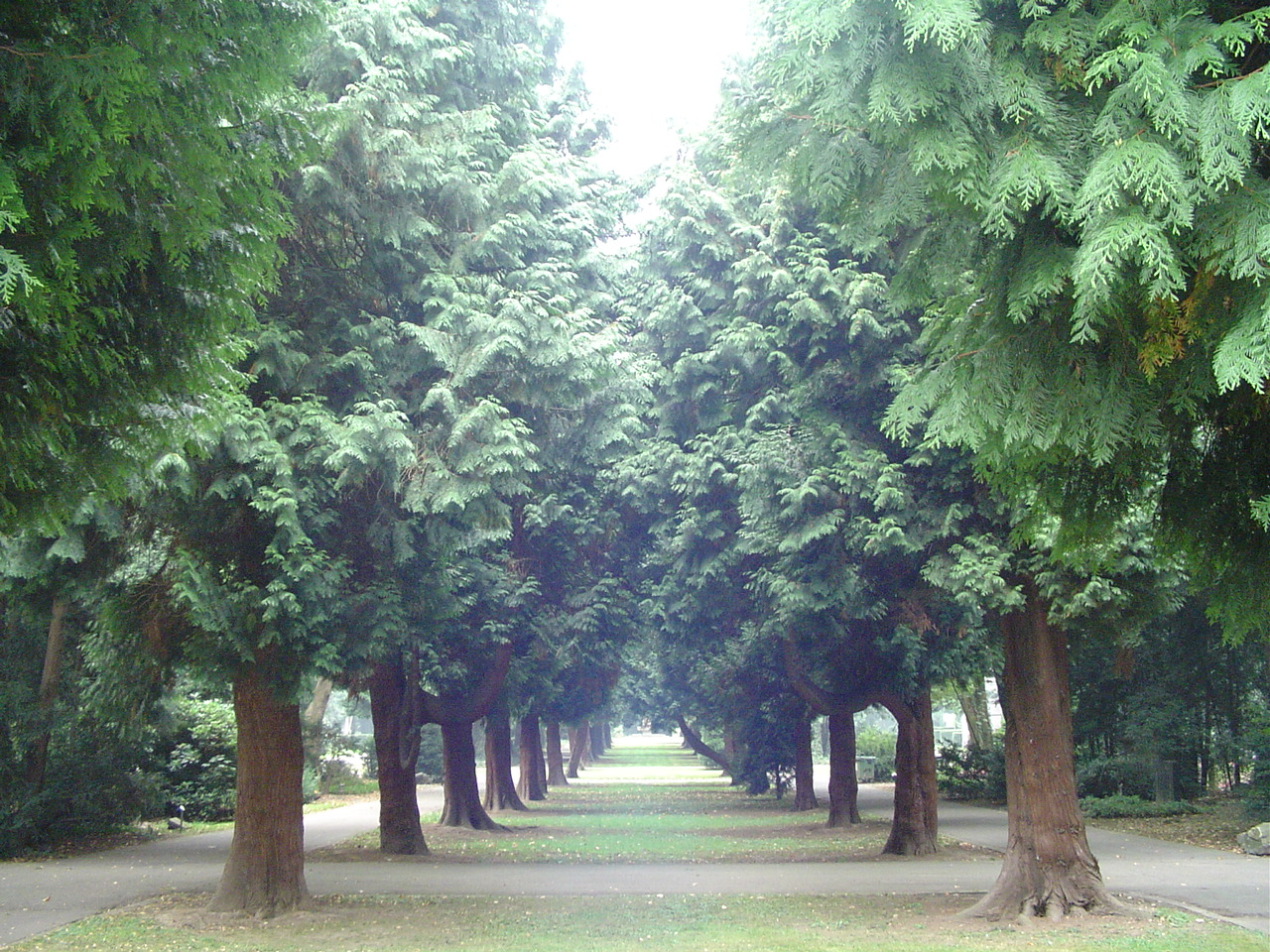 Nordfriedhof (Köln)